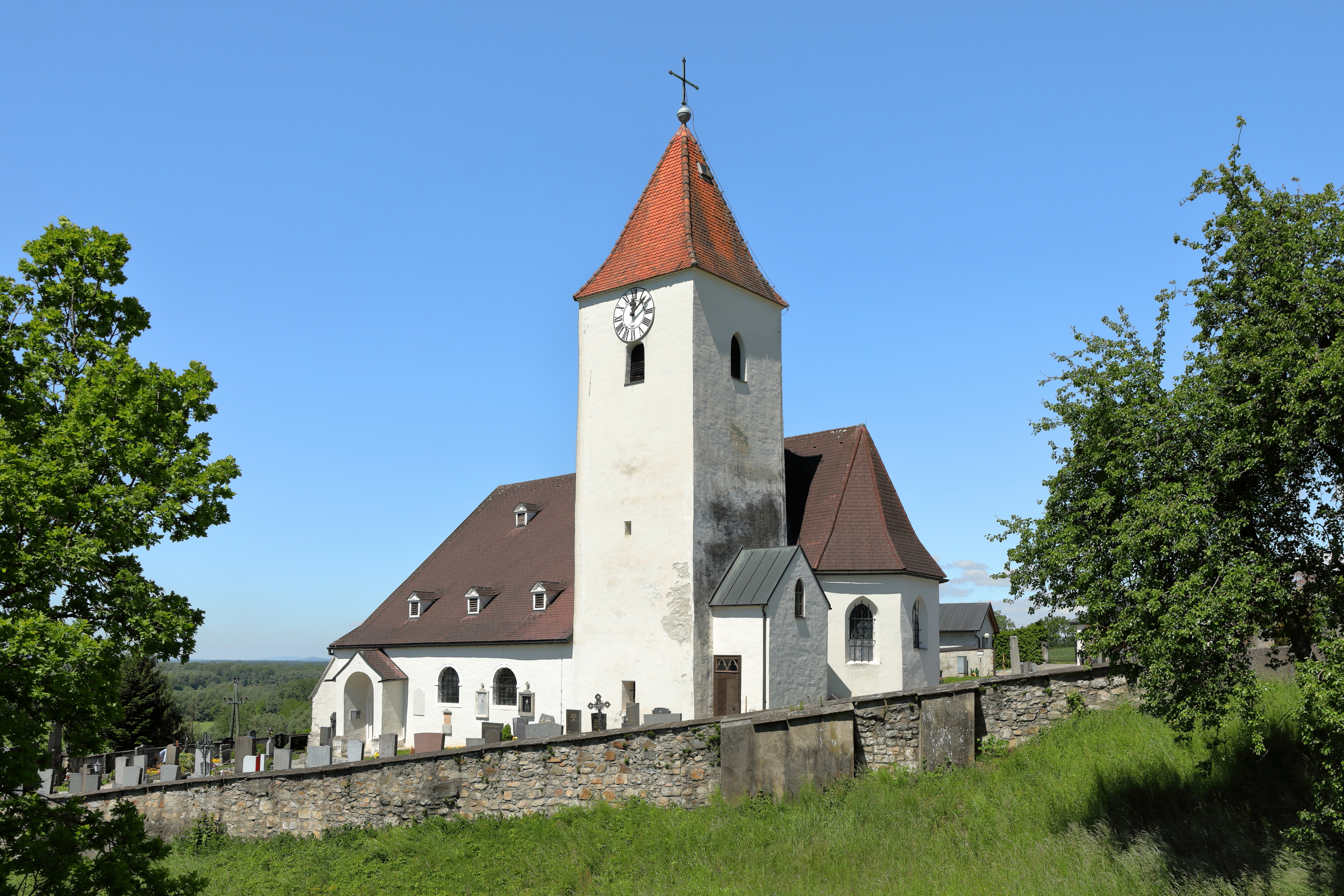 Südostansicht der Pfarrkirche hl. Nikolaus in Ardagger Markt, ein Ortsteil der niederösterreichischen Marktgemeinde Ardagger.Die Kirche befindet sich hoch über dem Ort und ist von einem Friedhof umgeben. Der Sakralbau ist romanischen Ursprungs, hat einen gotischen Chor und einen massiven mittelalterlichen Südturm.